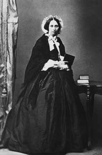 Варвара Александровна Лопухина, ур. Оболенская